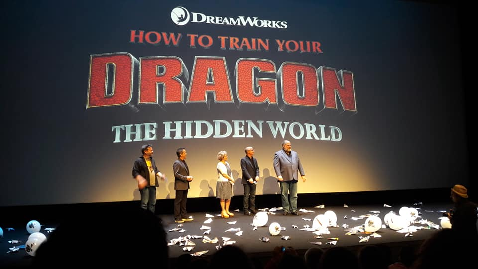 Présentation de Dragons 3 au festival international du film d'animation d'Annecy 2018.